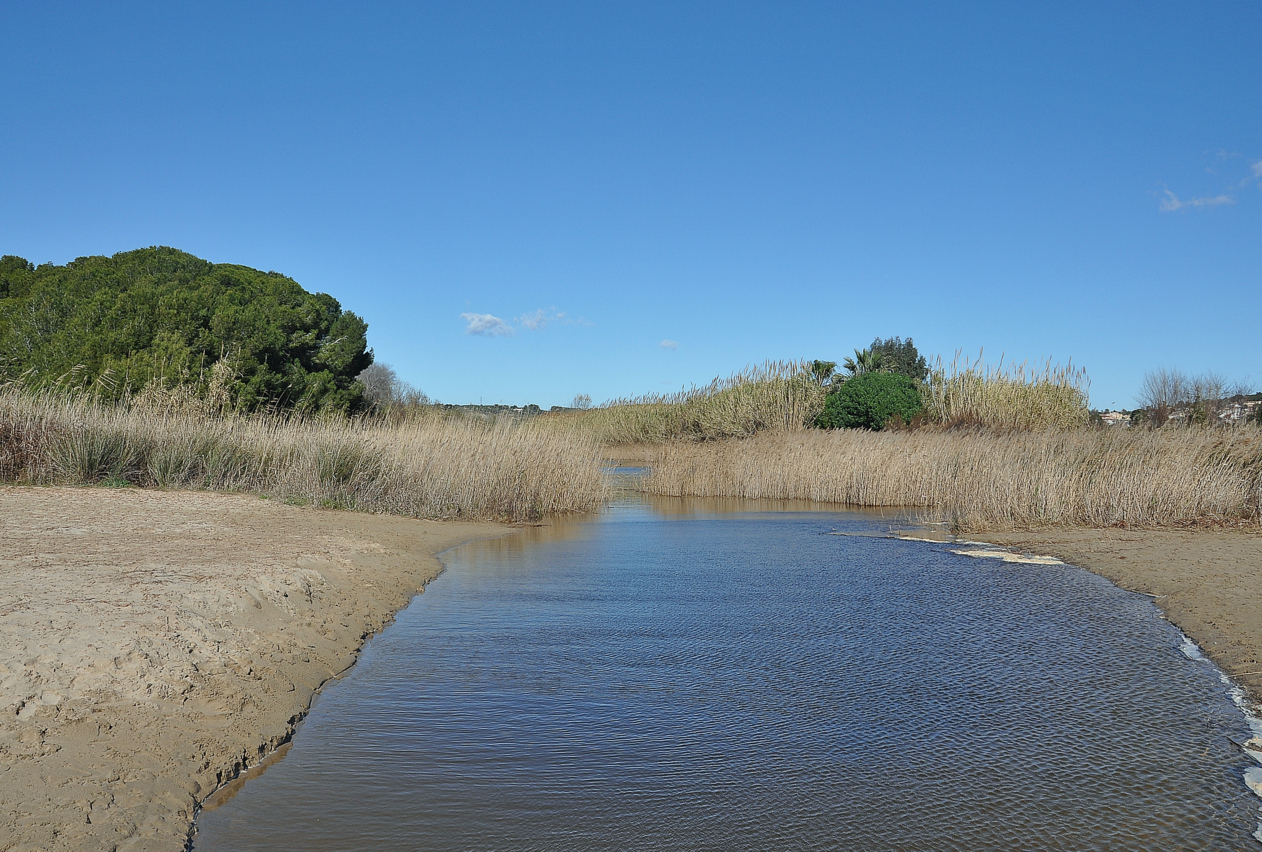 Tarragona